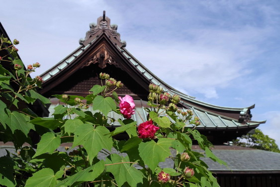 東慶寺の書院。